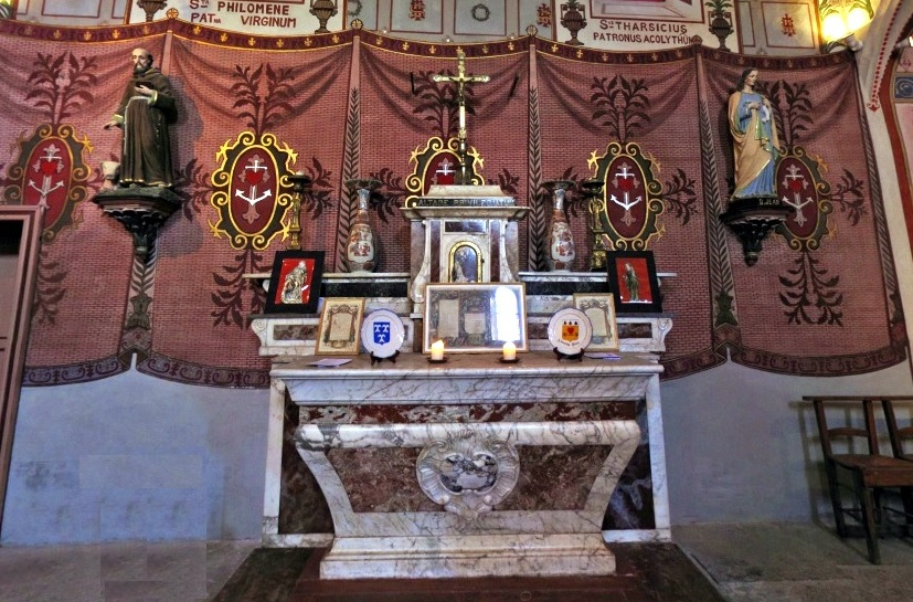 Laroque - Autel majeur de la chapelle Saint-Jean.